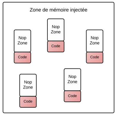 Illustration du type d'objet et de la zone mémoire utilisés pour le Heap Spraying